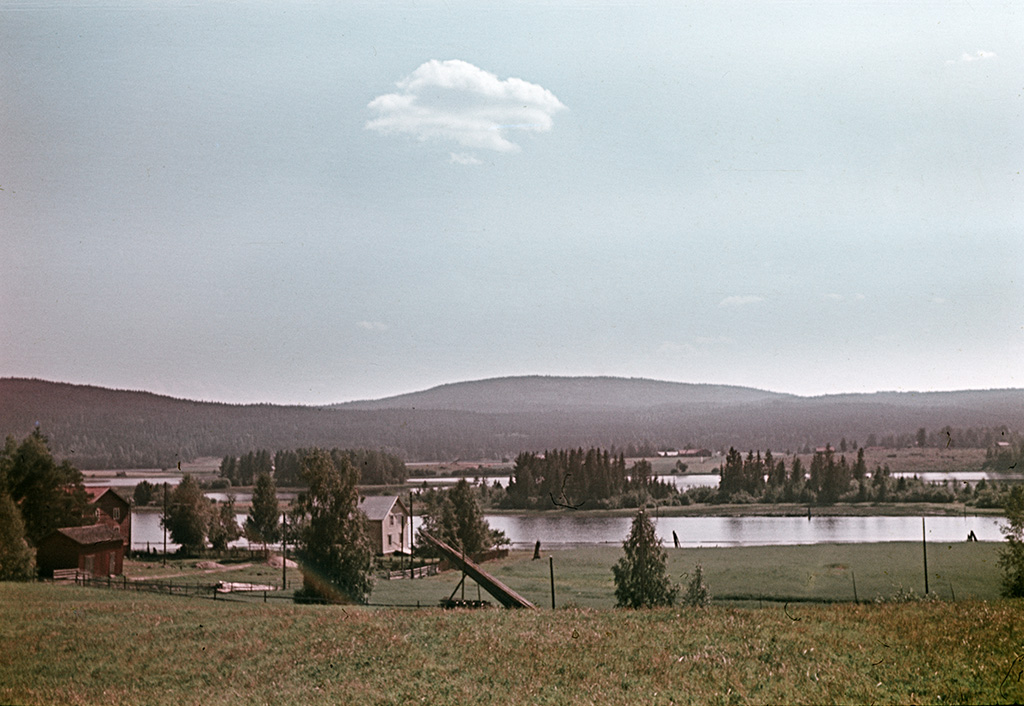 Outskirts of Sollefteå town, by Ångermanälven river. Utkanten av Sollefteå, vid Ångermanälven. Parish (socken): Sollefteå Province (landskap): Ångermanland Municipality (kommun): Sollefteå County (län): Västernorrland Photograph by: Fredrik Bruno Date: 1944 Format: Colour slide Persistent URL: Read more about the photo database (in english)